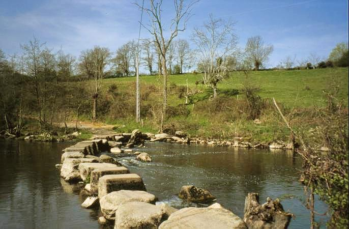 Gué sur le Thouet (1)